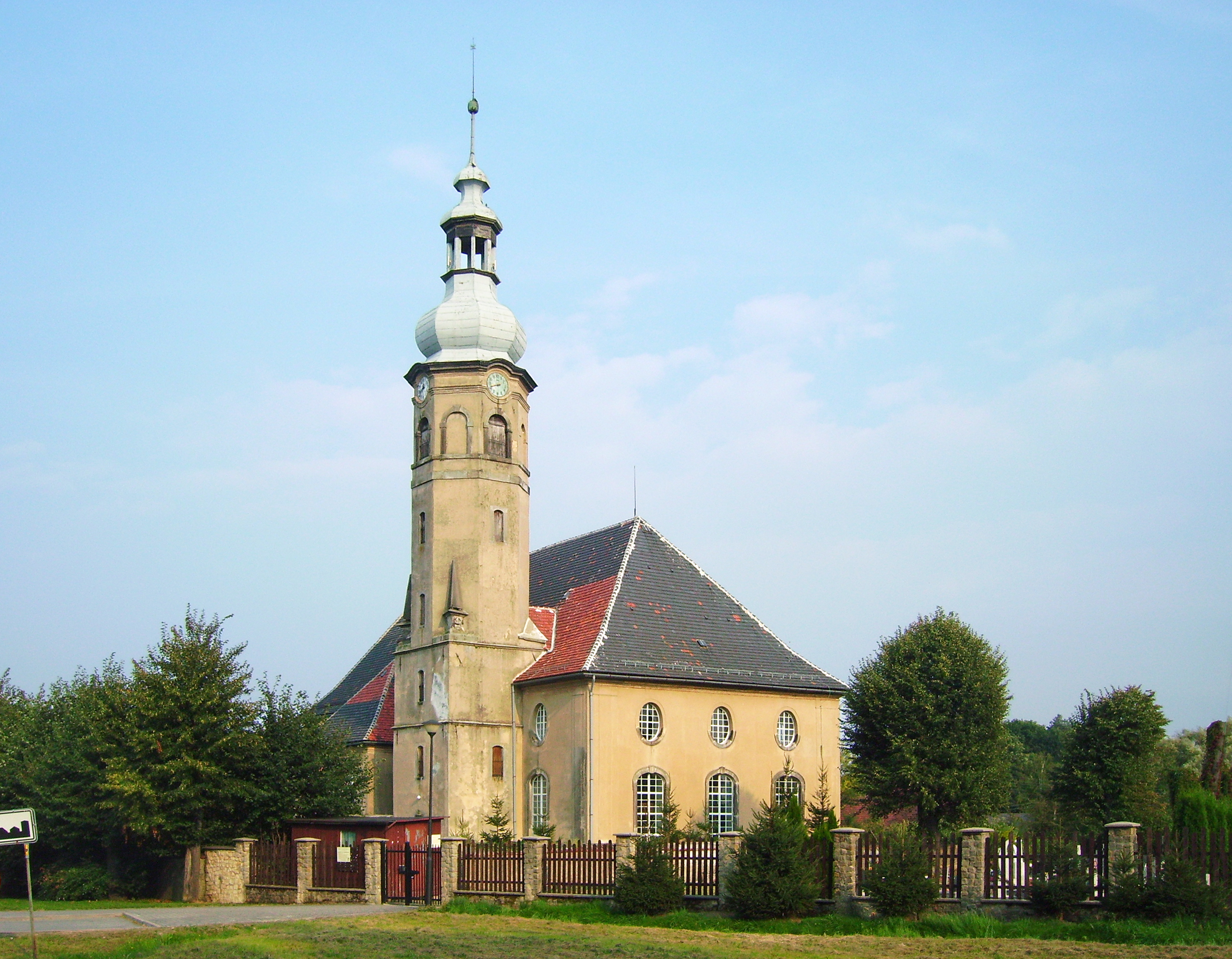 Biedrzychowice, kościół ewangelicki (graniczny), ob. rzym.-kat. fil. p.w. św. Antoniego, XVIII